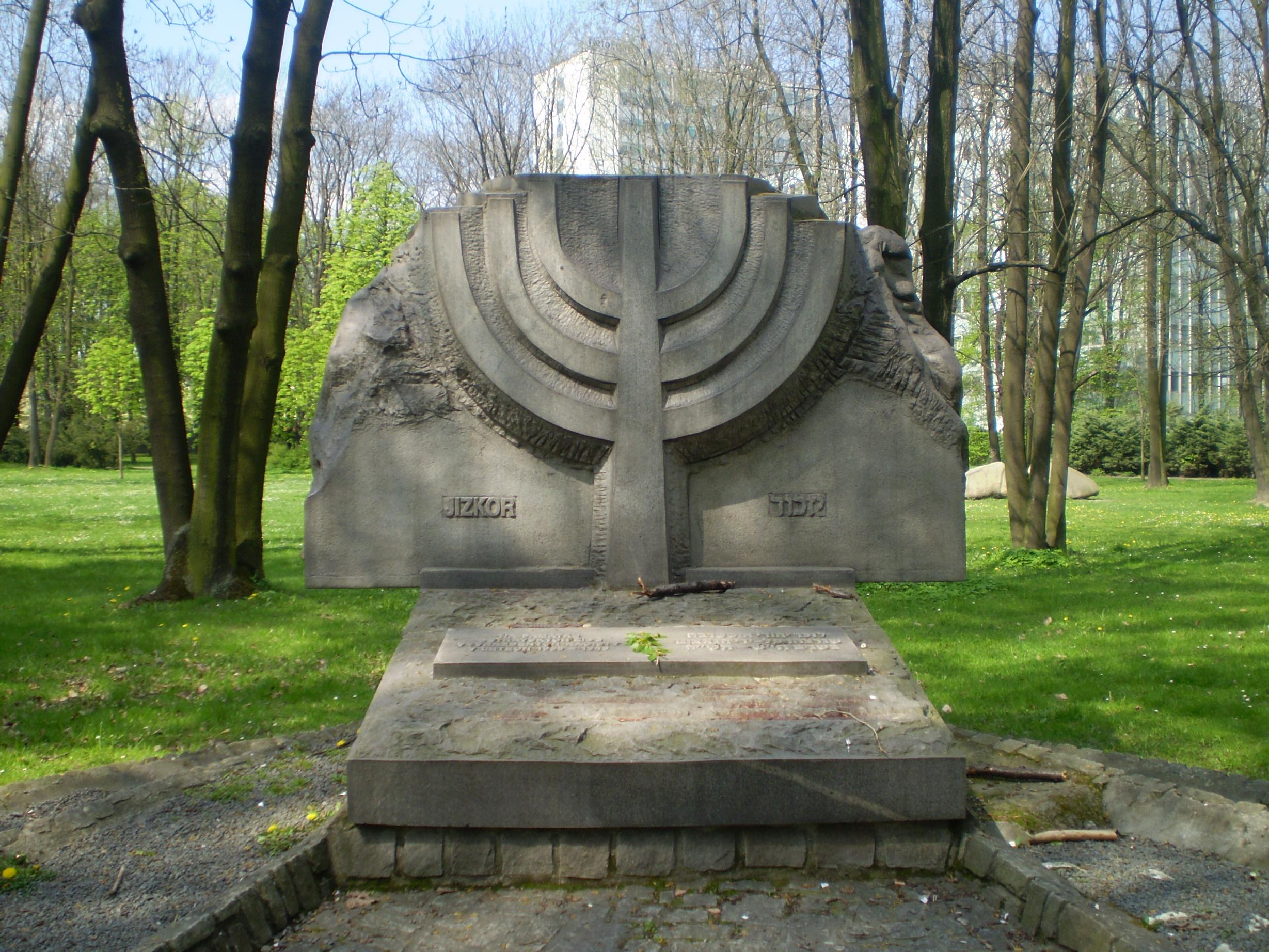 Detail památníku v parku Milady Horákové v Ostravě